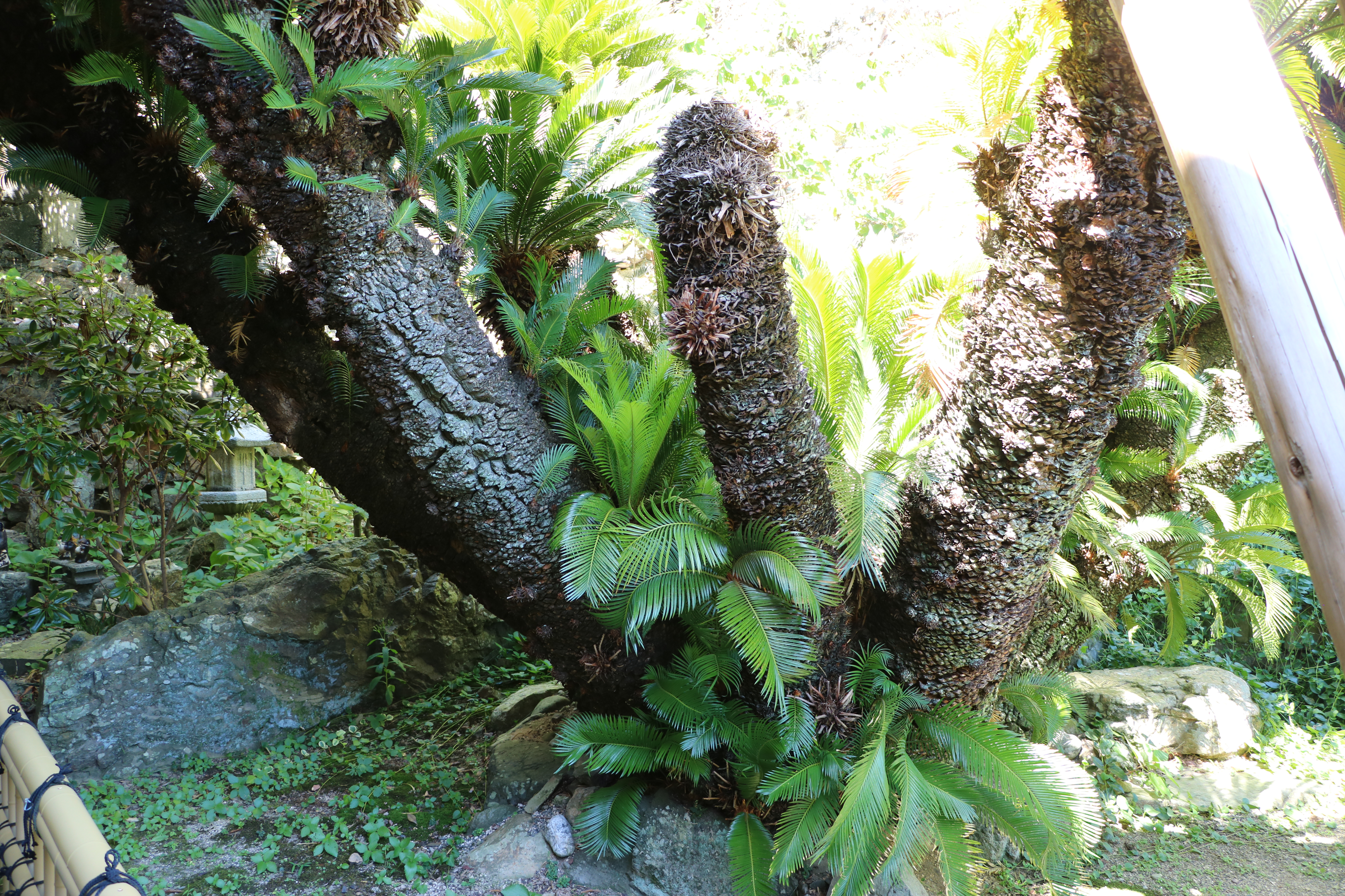 常神のソテツ（国指定天然記念物、福井県三方上中郡若狭町）